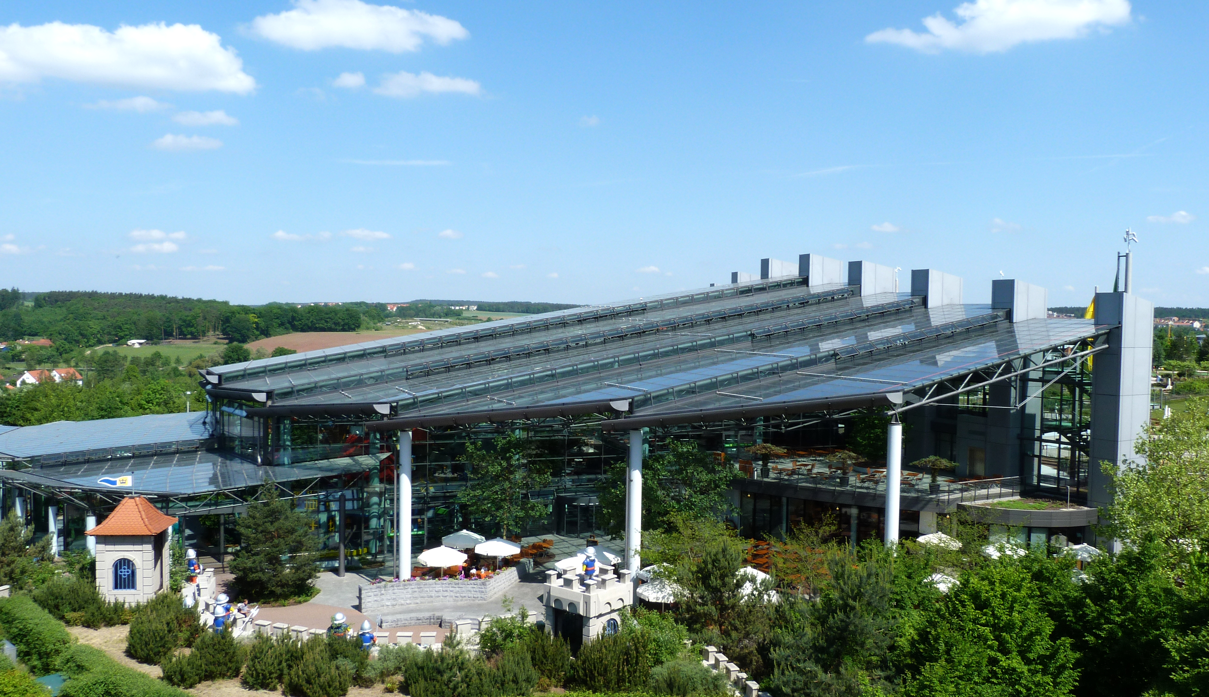 HOB-Center